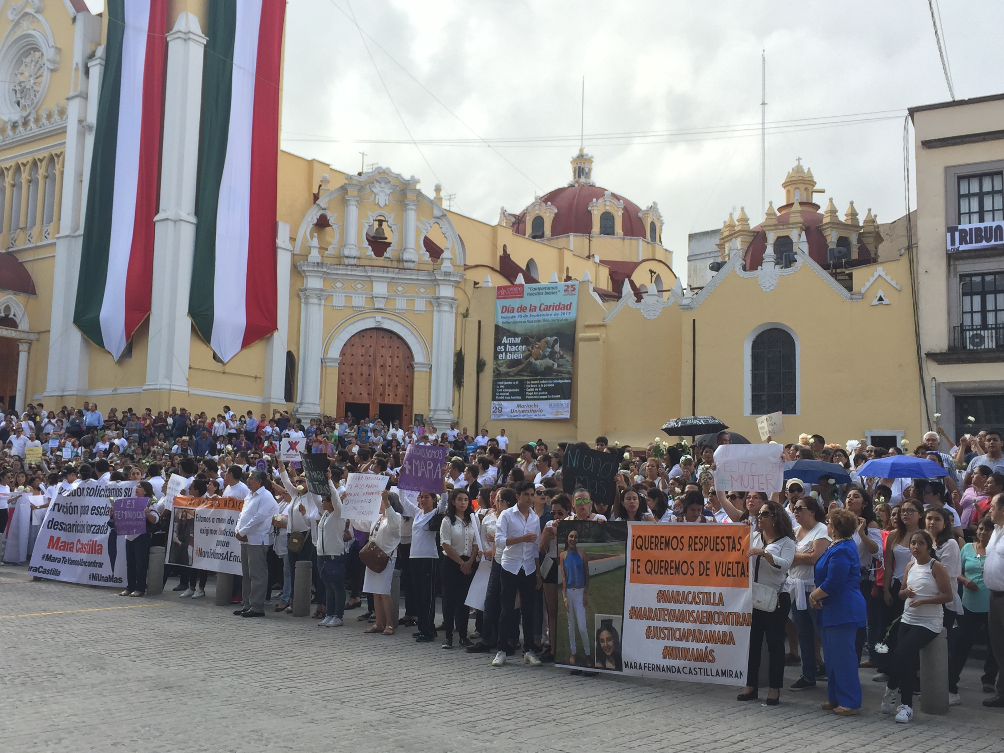 Los asistentes a la marcha por Mara Castilla concluyen la manifestación en la Plaza Lerdo de la ciudad de Xalapa.